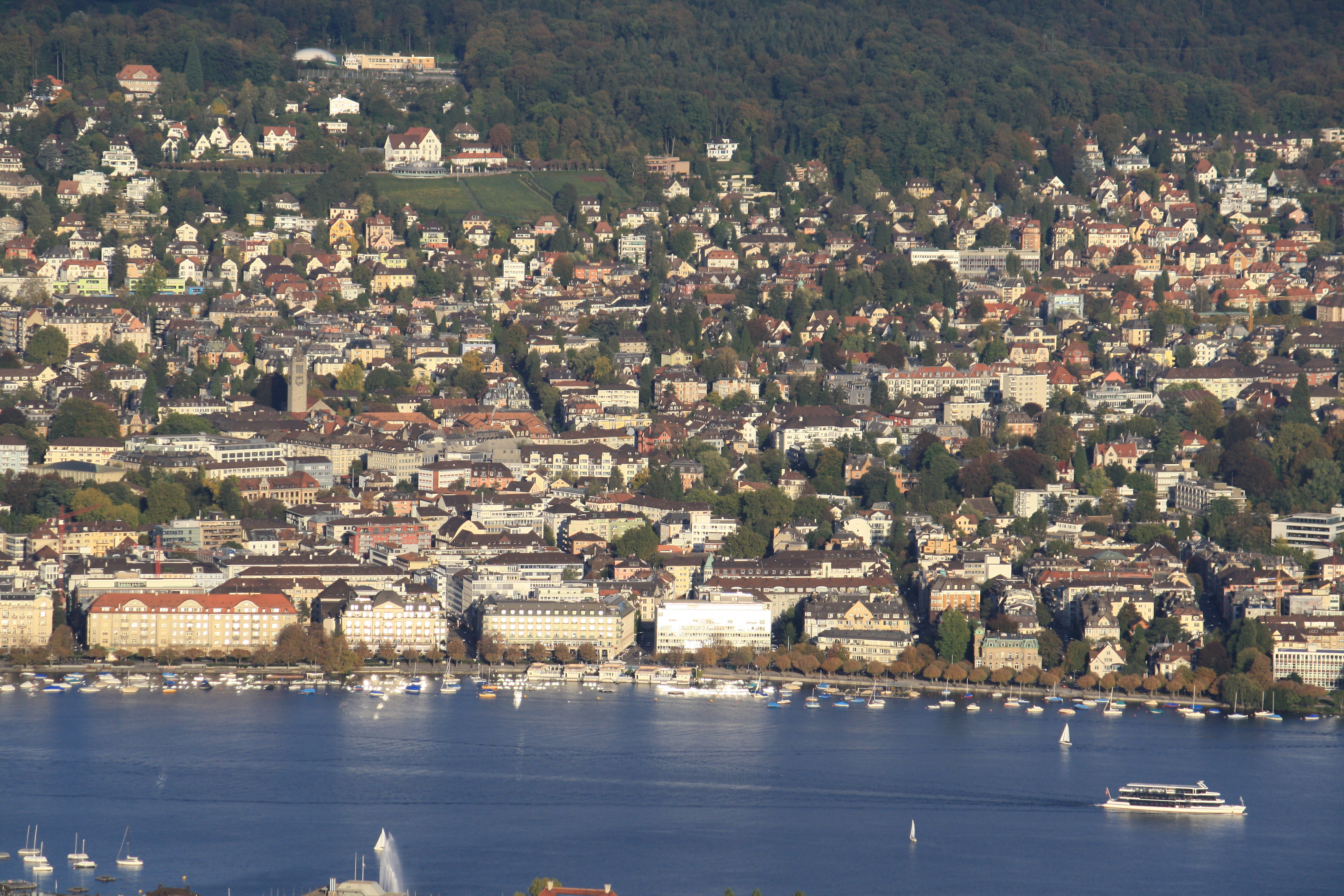 Adlisberg and Zürich-Hottingen, as seen from Uetliberg Aussichtsturm, Seefeld quarter in the foreground.